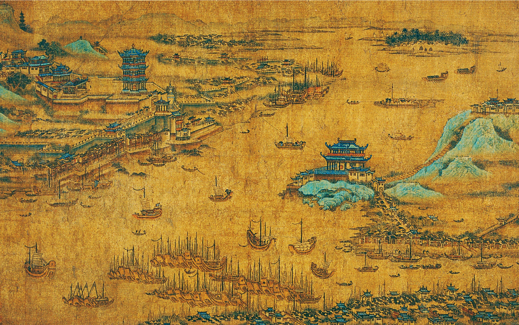 明-江汉揽胜图轴